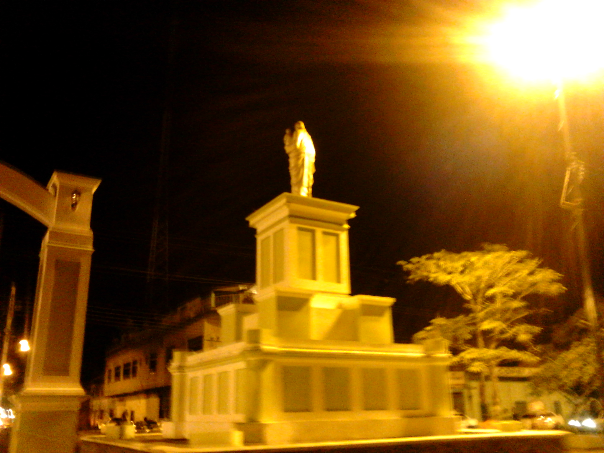 Monumento a San José,Paseo Malecon Manamo, Estado Delta Amacuro